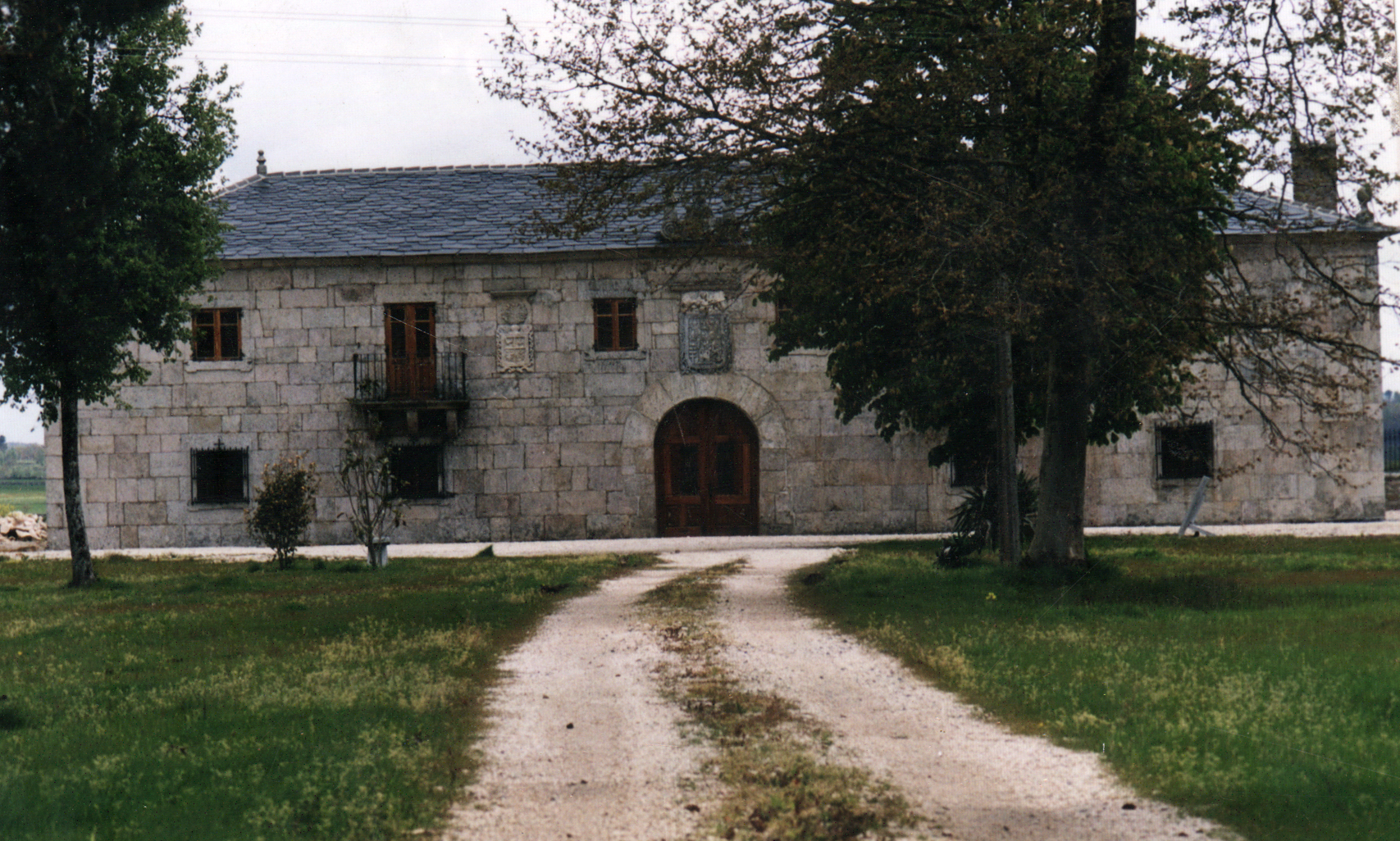 Pazo do Tumbiadorio (Vilamaior) Sarria